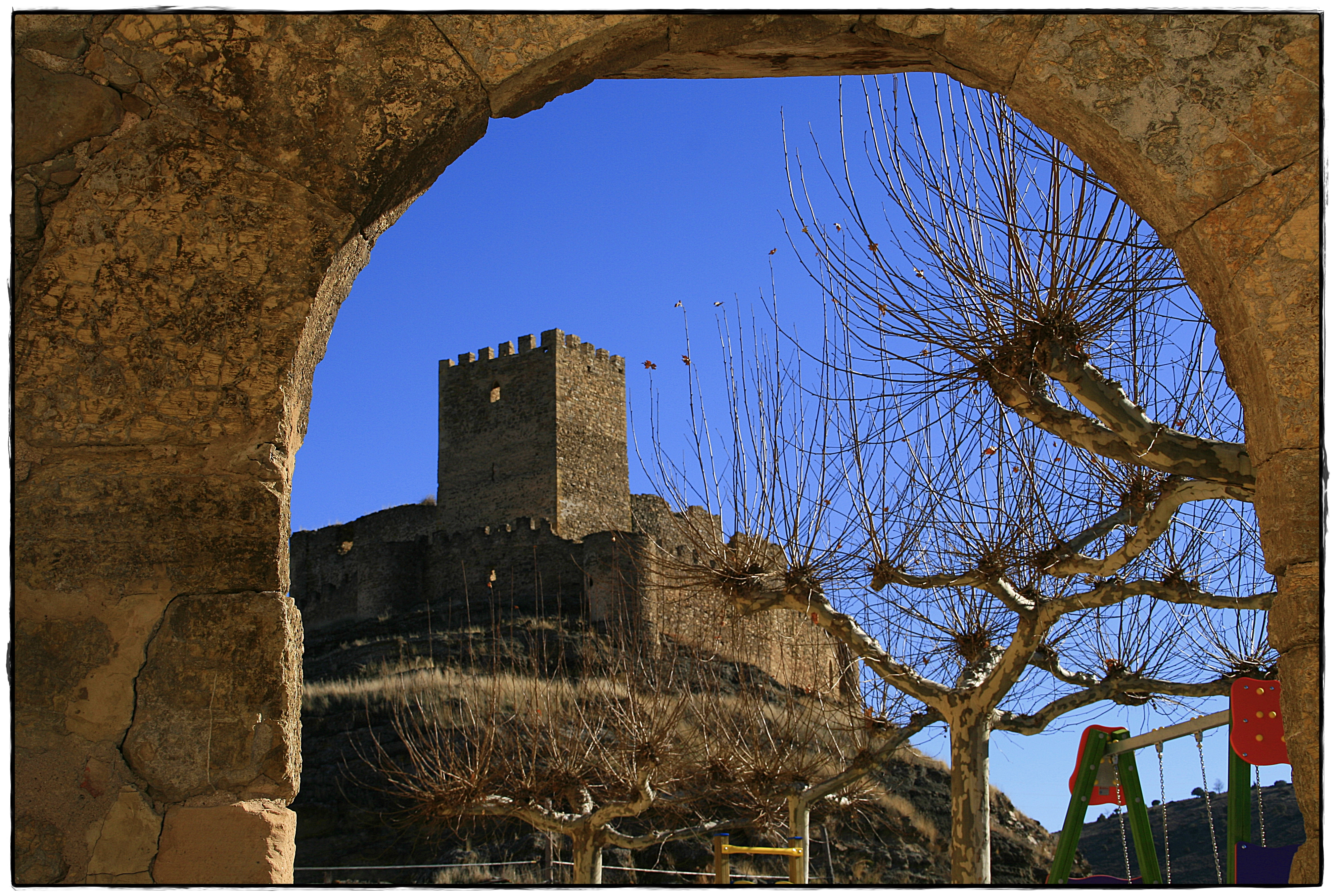 El castillo de Magaña se alza sobre un monte relativamente apartado de la localidad del mismo nombre, en la comarca de Tierras Altas y Valle Ter de la provincia de Soria. El castillo, construido en mampostería, está compuesto por un doble recinto en torno a la torre del homenaje, que es de origen bereber, siglos IX a XI, y por tanto muy anterior al resto del castillo. Esta torre forma parte de la red de grandes torres aisladas de origen bereber levantadas a lo largo del valle del Rituerto, como las de Masegoso, Trébago, Noviercas, Castellanos, La Pica o Aldealpozo. La torre conserva restos del almenado superior y algún ventanal con sillares labrados. El recinto interior es muy alto, de planta cuadrada, con la torre del homenaje en una de sus esquinas y cubos en las otras dos. El recinto exterior es mucho más bajo y de planta irregular, y cuenta con siete cubos repartidos por el perímetro del cerco.